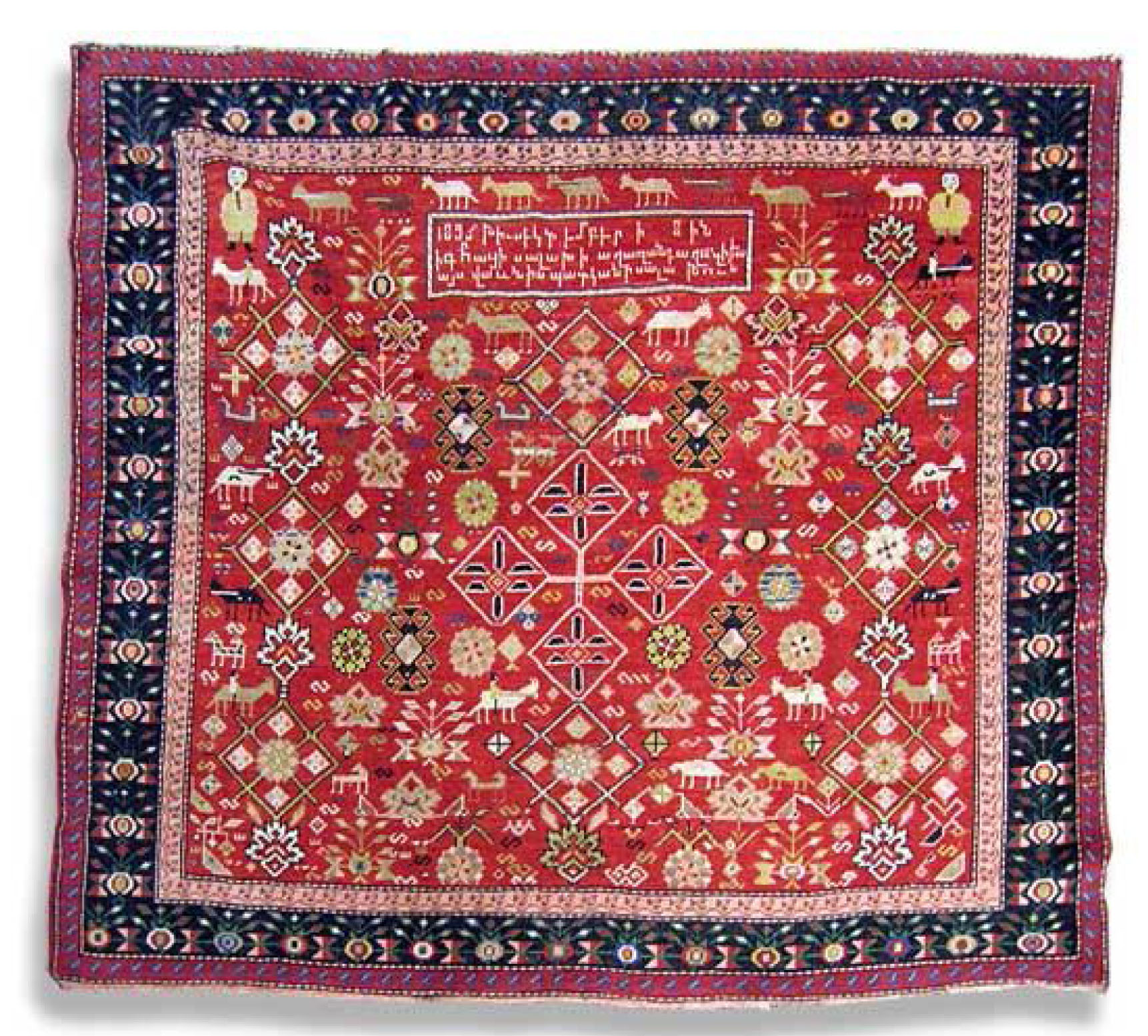 Armenian Karabagh inscribed rug.